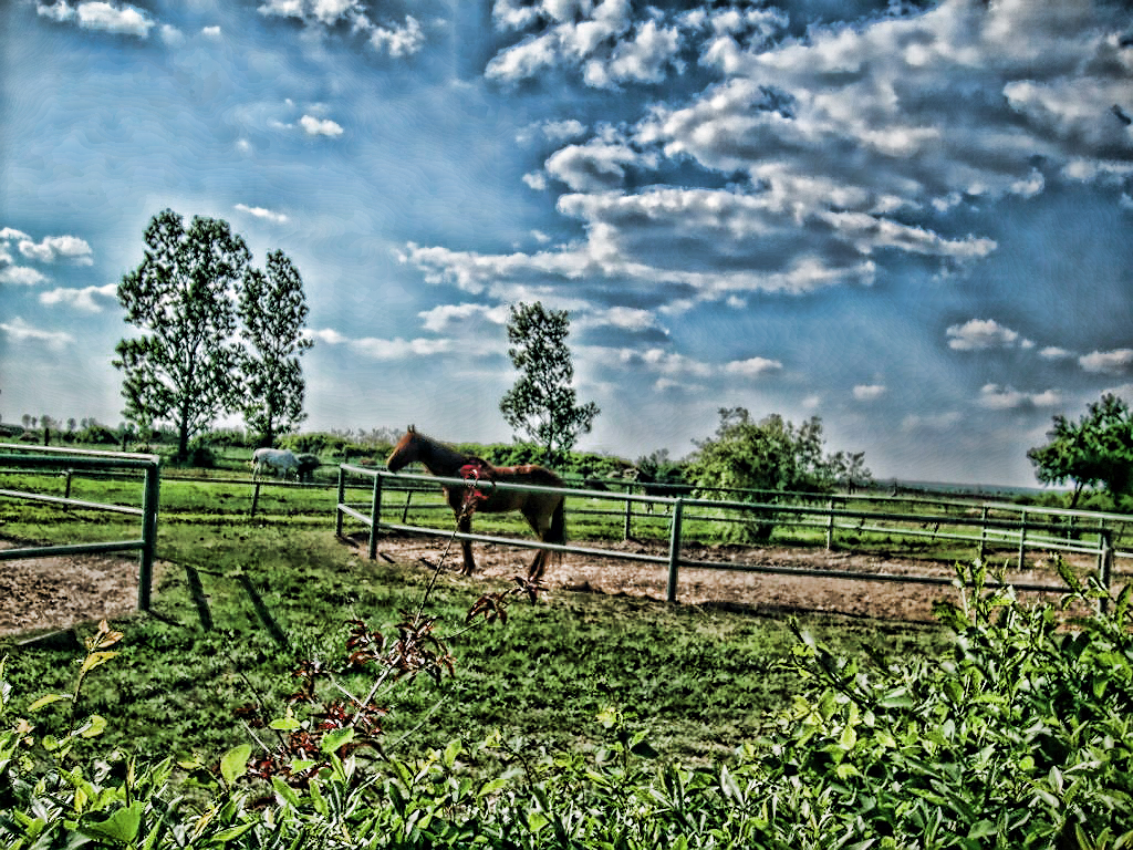 herghelia de la izvin